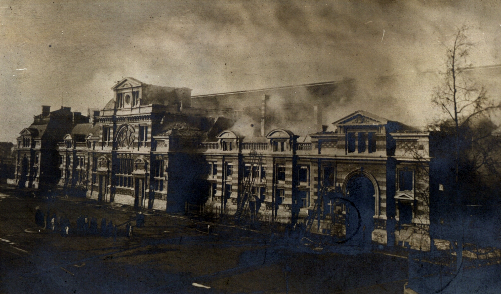 La gare de Tournai passe au feu en 1912.